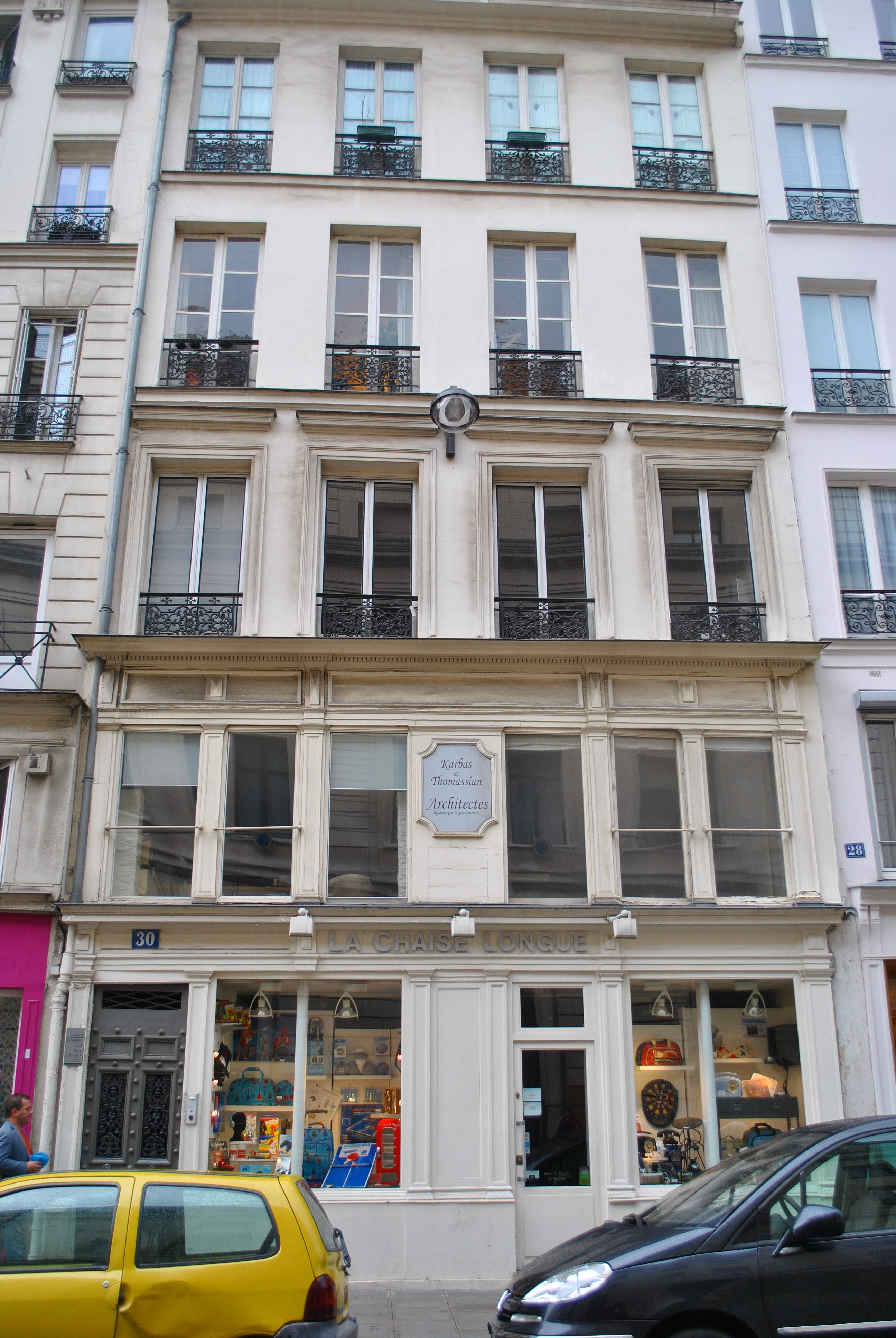 Ulice Rue Croix-des-Petits-Champs, dům č. 30, kde sídlila redakce exilového časopisu Svědectví